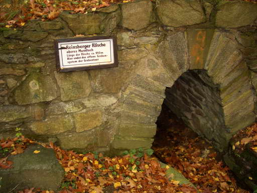 Reinsberger Rösche Andere Versionen